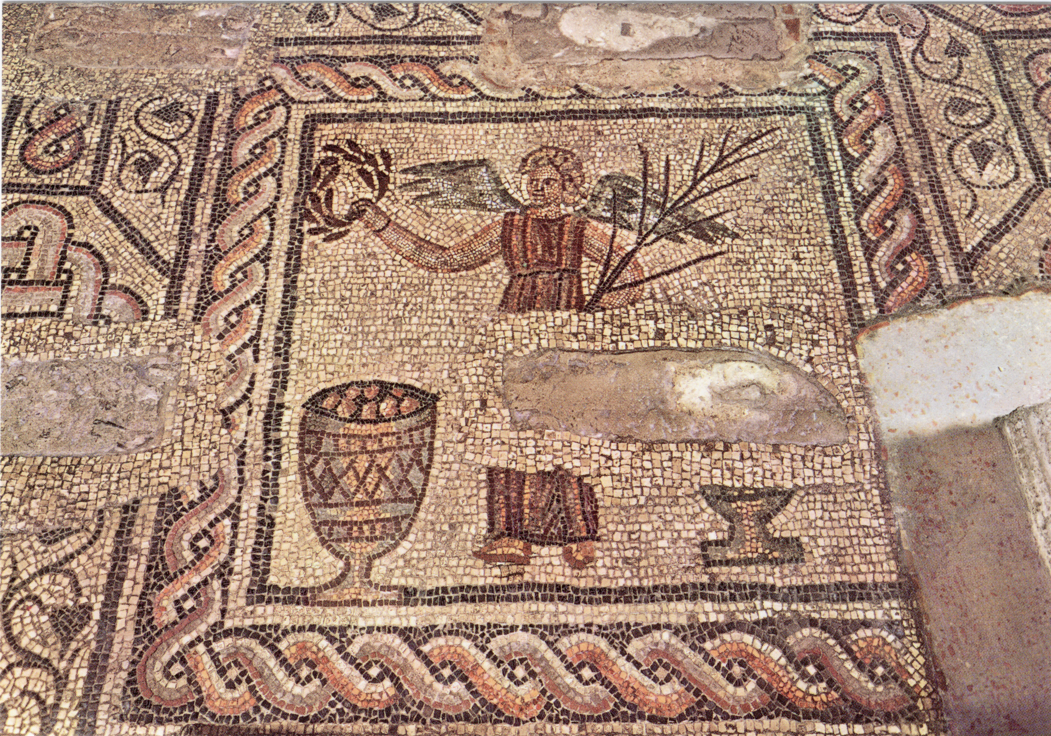 Aquileia - Basilica - Vittoria eucaristica